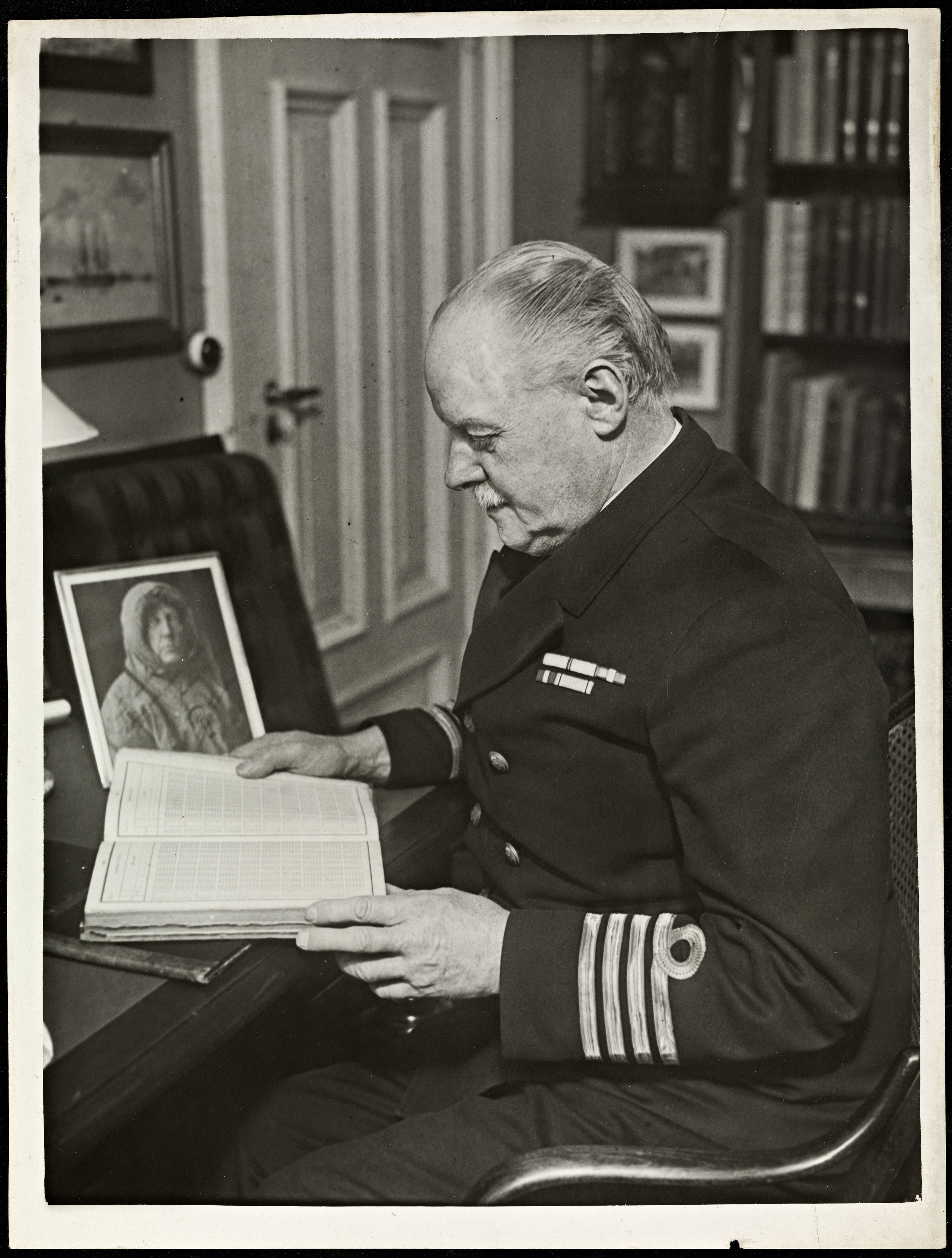 Beskrivelse / Description: Godfred Hansen var dansk marineoffiser og polarfarer. Han var også nestkommanderende på Roald Amundsens "Gjøa"-ekspedisjon 1903–06, hvor han også fungerte som navigatør, astronom, geolog og fotograf. Dato / Date: 1937 Sted / Place: Danmark Fotograf / Photographer: ukjent / unknown Digital kopi av original / Digital copy of original: s/h papirpositiv Eier / Owner Institution: Nasjonalbiblioteket / National Library of Norway Lenke / Link: Bildesignatur / Image Number: blds_06033